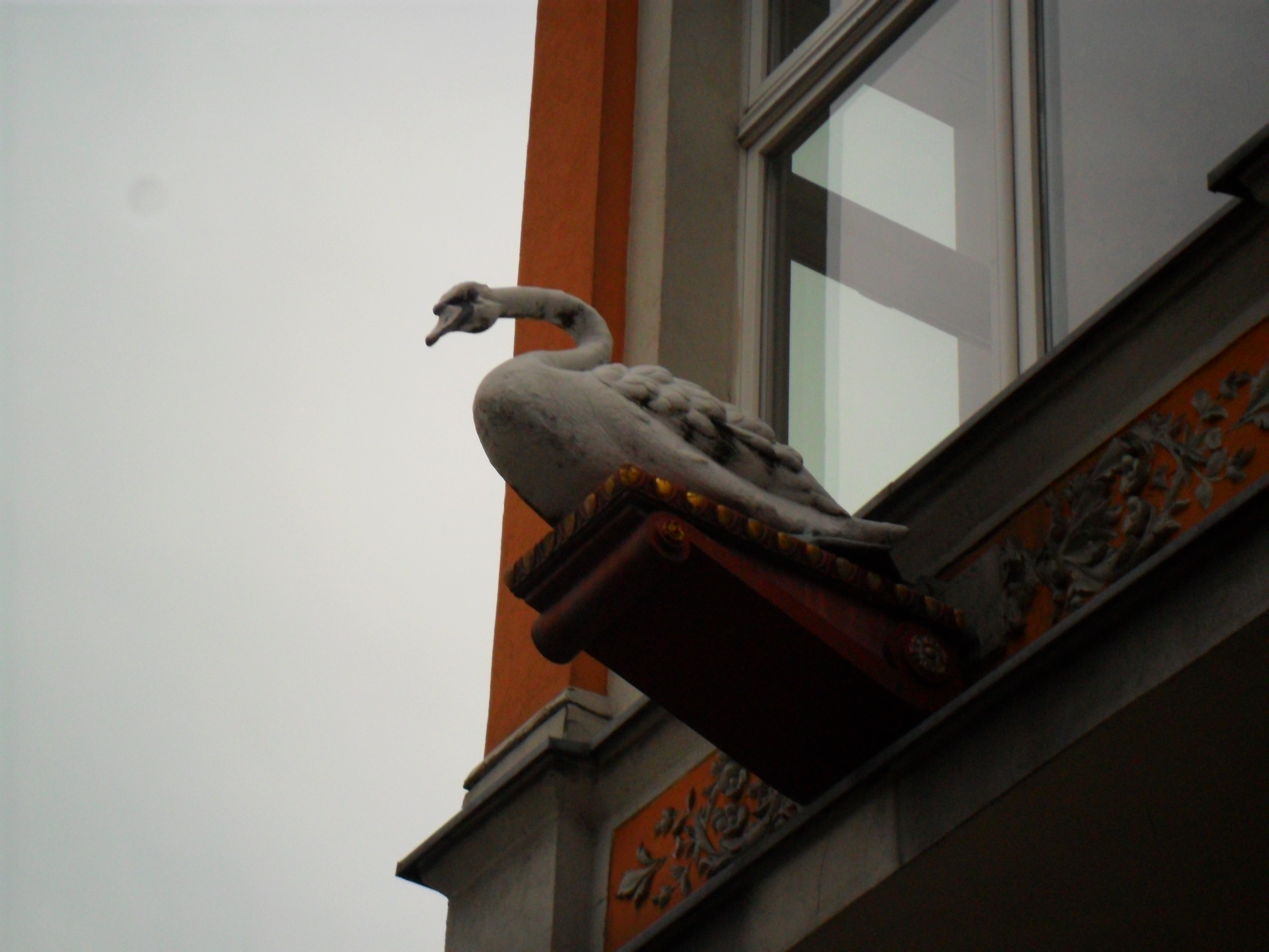 Łabędź w narożnej kamienicy na placu Wolności w Raciborzu